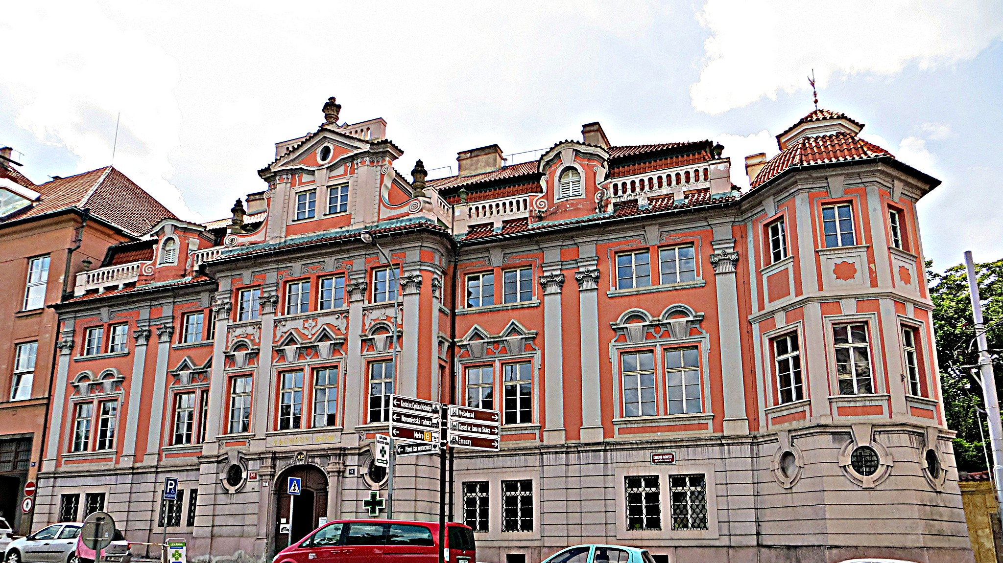 Faustův dům